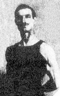 Antoine Costa vers 1910.